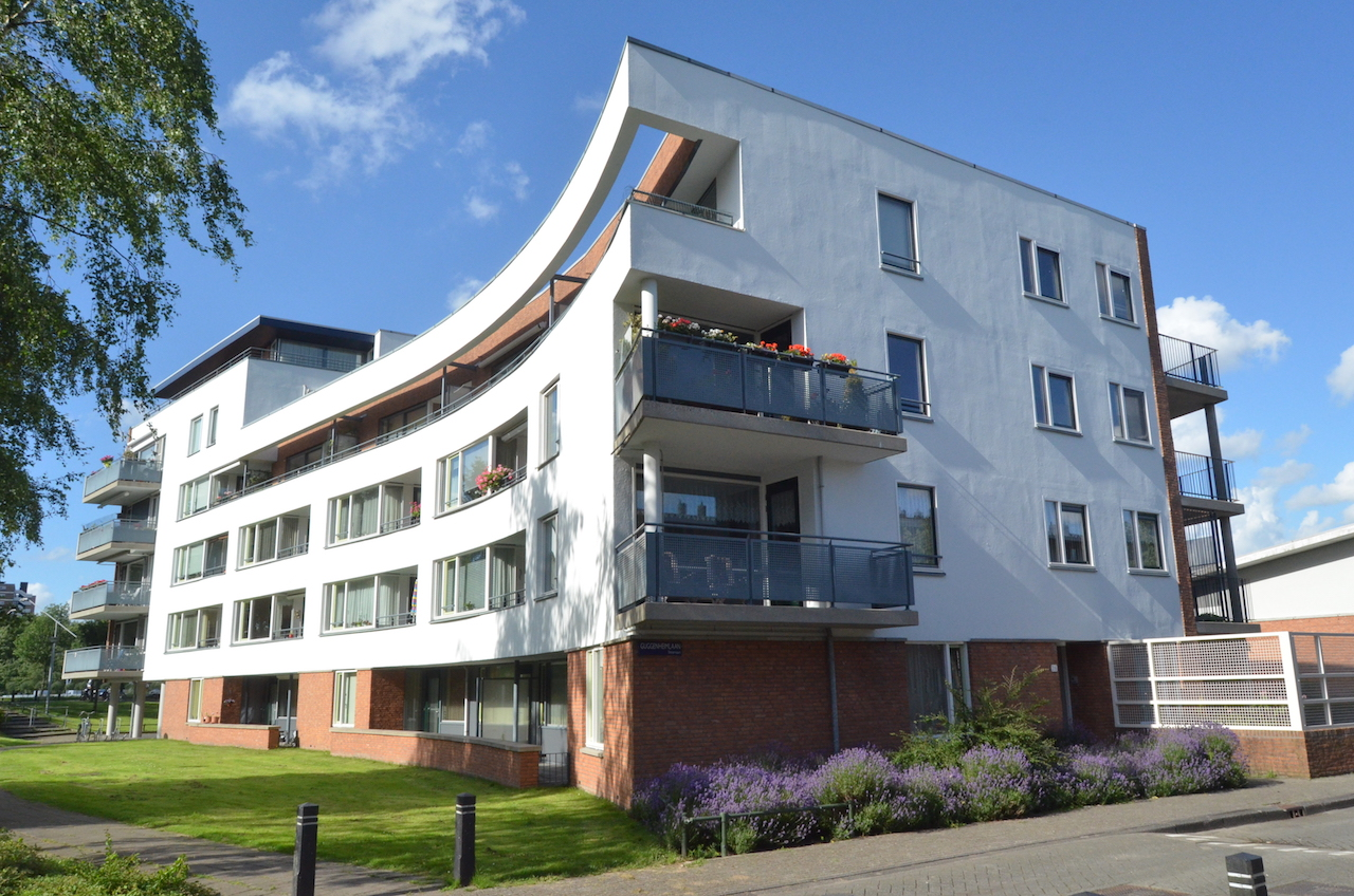 Lanenkwartier. Foto: Erik Swierstra.